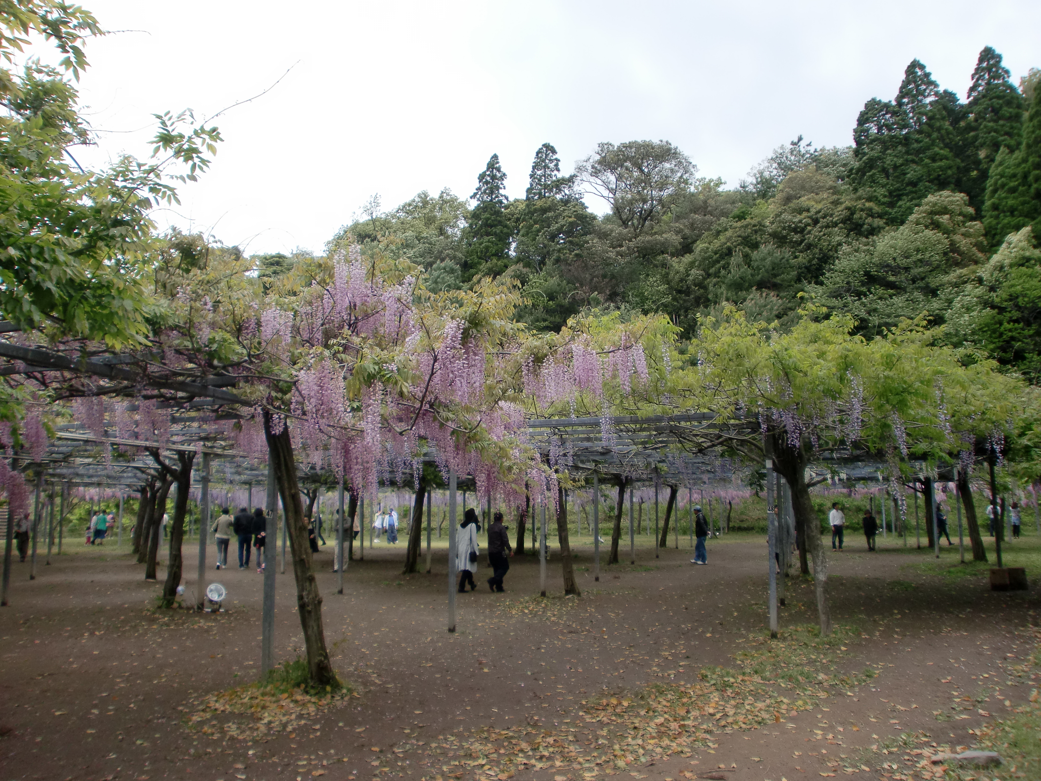 和気神社の境内にあるフジ園。藤まつり期間中は多くの客で賑わう。